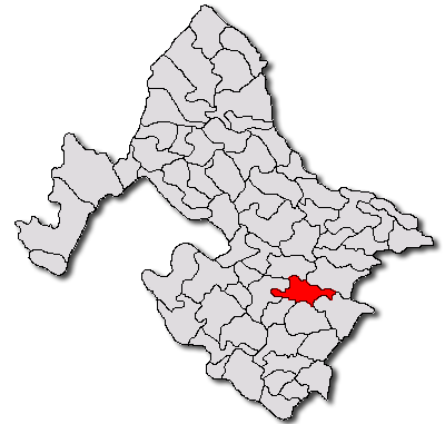 Categorie:Hărţi ale judeţului Mehedinţi